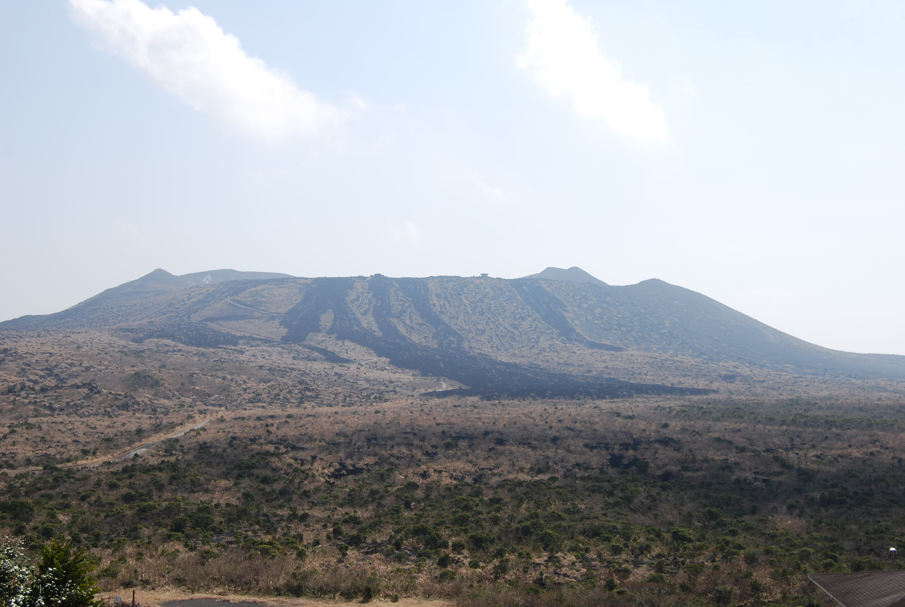 伊豆大島 三原山 全景